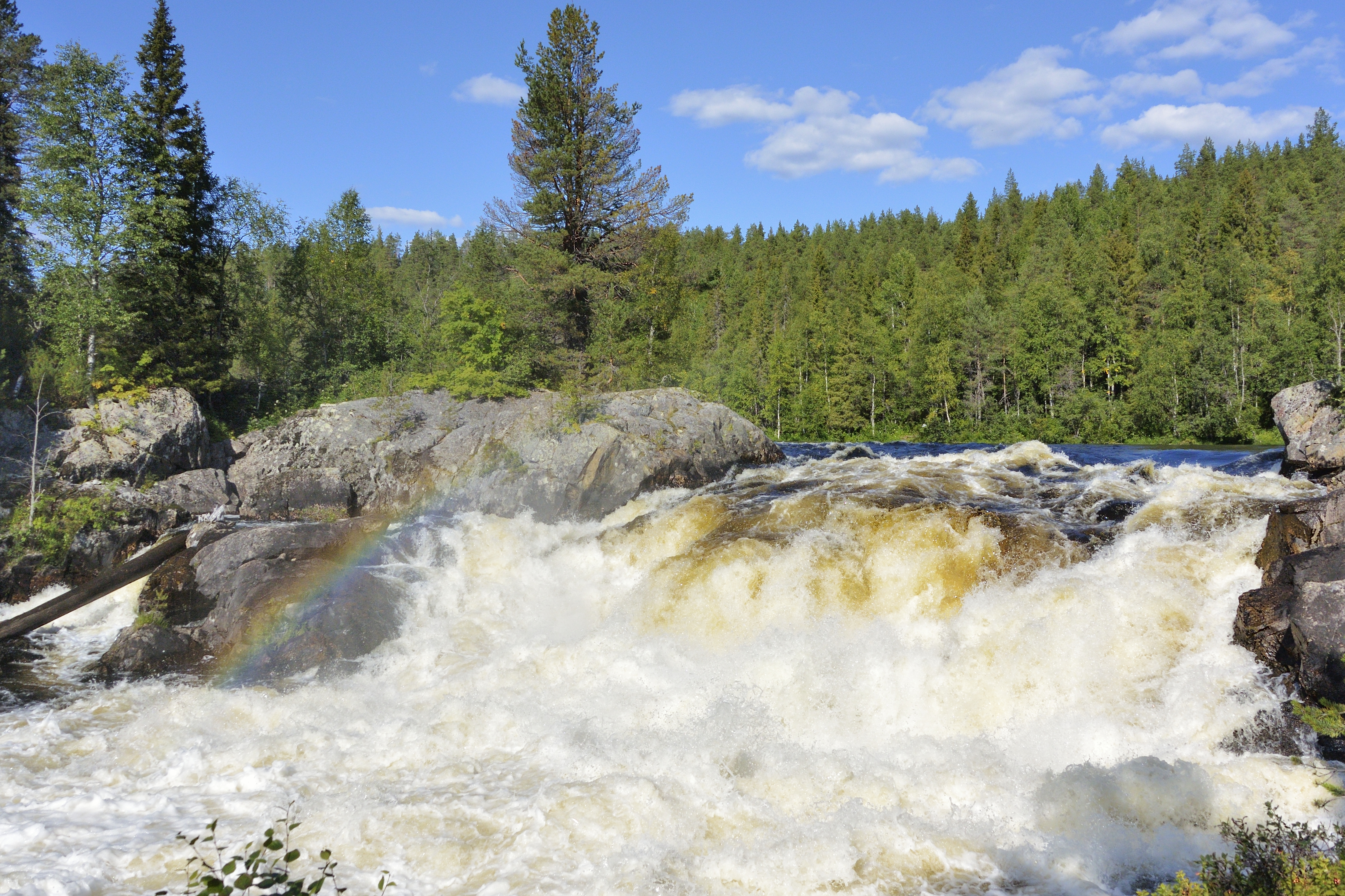 Паанаярви: Западная граница национального парка совпадает с государственной границей России с Финляндией. Со стороны финской границы к “Паанаярви” примыкает национальный парк “Оуланка”,Лоухский район, This image is related to the protected area of Russia number 1000069